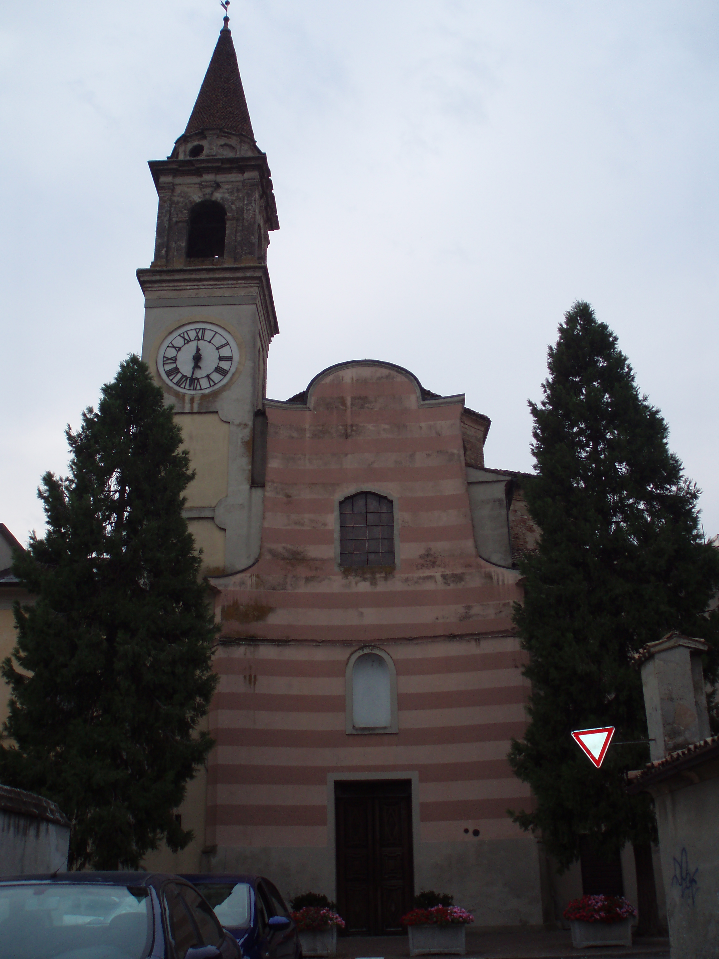 Vista della Chiesa di San Lorenzo a Cortemaggiore